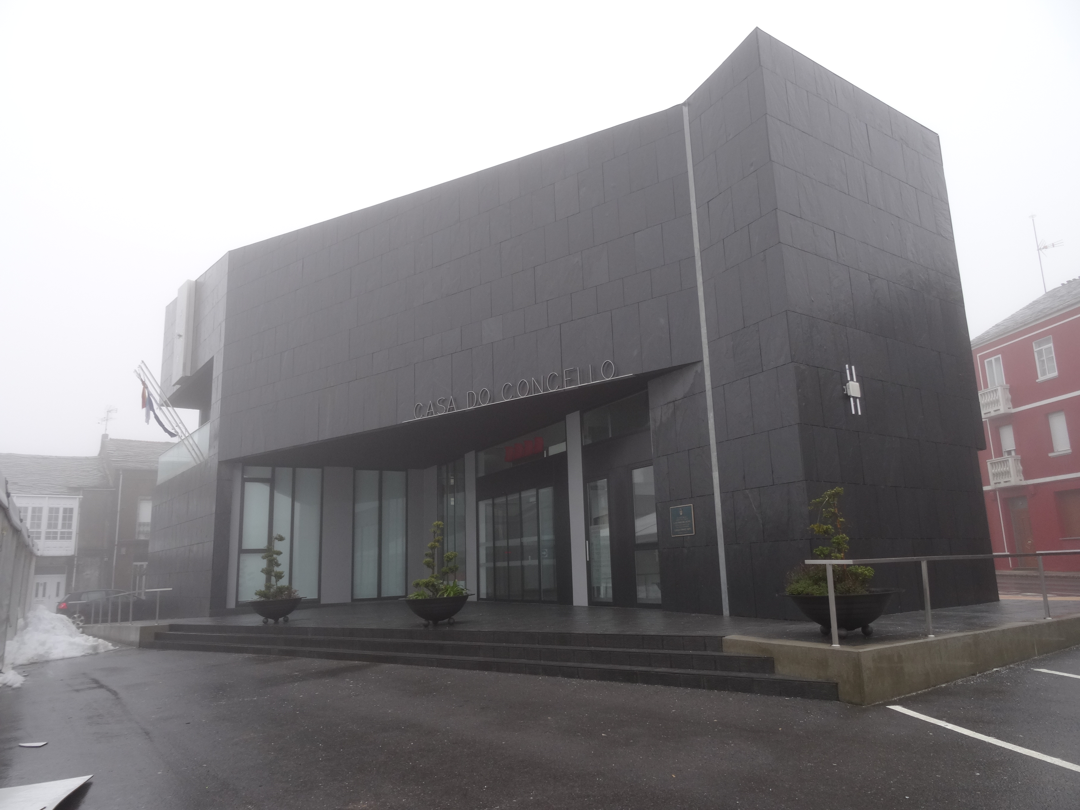 Casa do concello da Fonsagrada.